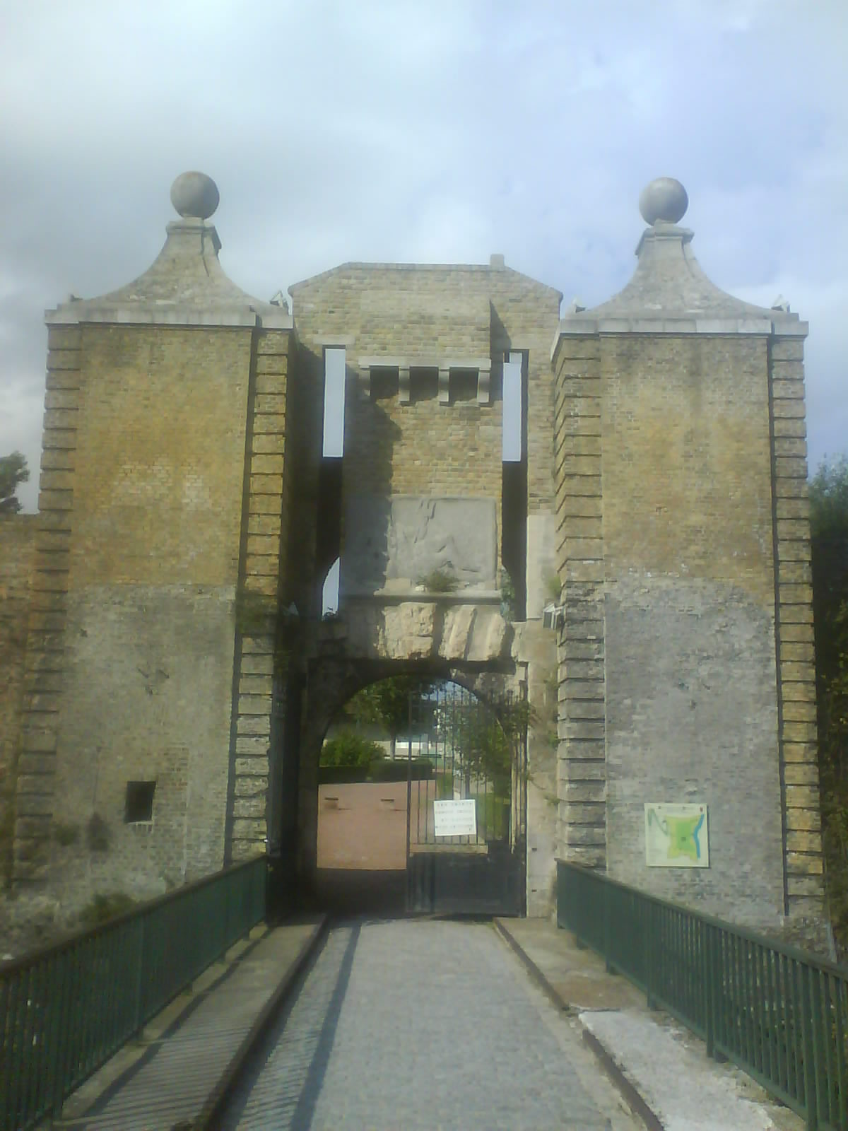 La Porte de Neptune, qui donne accès par l'Est à la Citadelle de Calais. Informations Description Photo de La Porte de Neptune, de la Citadelle de Calais. DatePhoto prise le 11/09/2008 à 11:08 à Calais.SourceOwn workAuthorfr:Utilisateur:Davy-62Permission (Reusing this file) Publié sous CC-BY-SA-2.0 Photo de La Porte de Neptune, de la Citadelle de Calais.